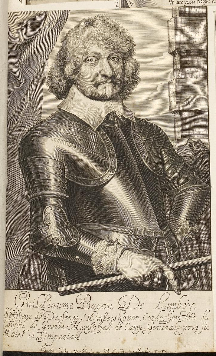 Grafik aus dem Klebeband Nr. 1 der Fürstlich Waldeckschen Hofbibliothek Arolsen Motiv: Guillaume de Lamboy, kaiserlicher Heerführer und General im Dreißigjährigen Krieg